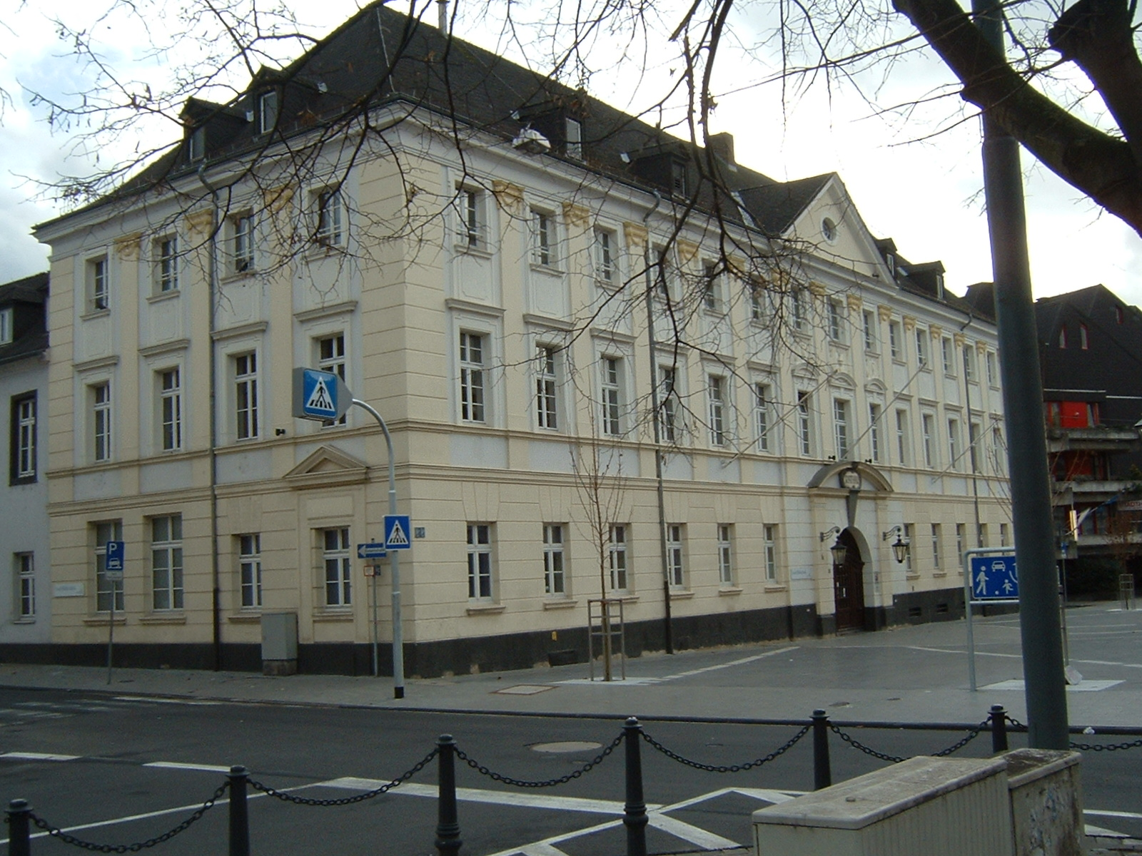 Altes Rathaus Neuwied F.Lang eig.Bild 25.02.07